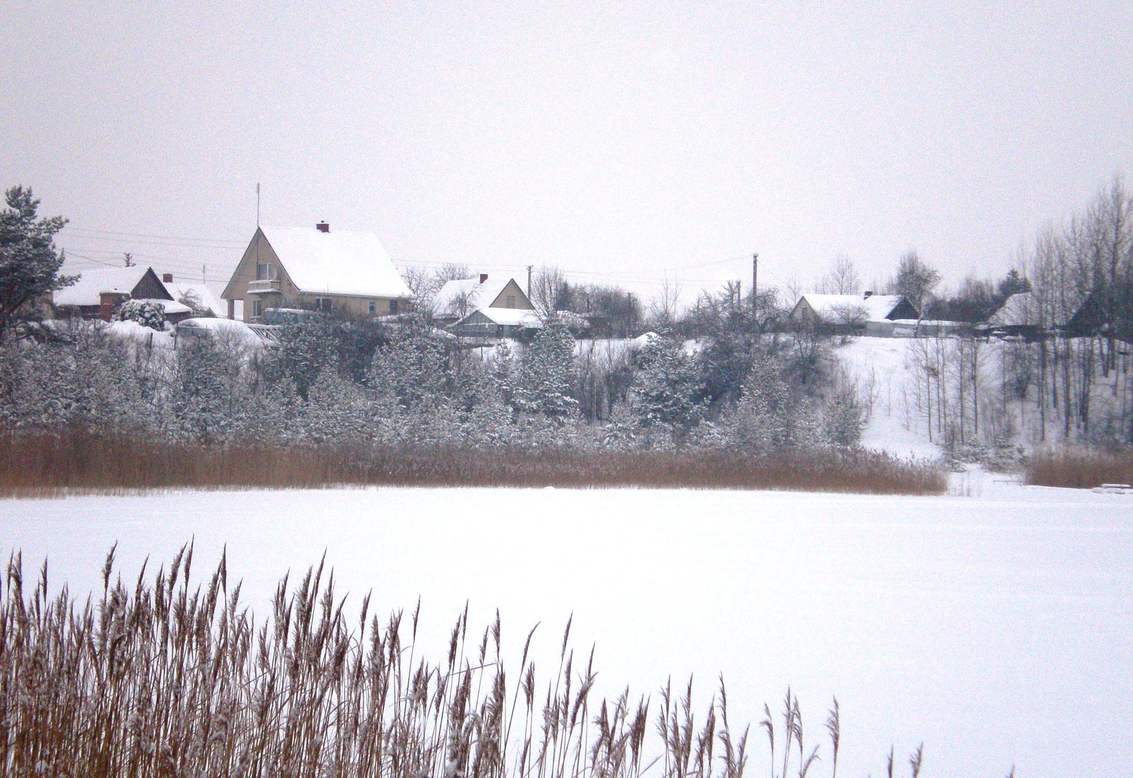 Babėnai karjero pakrantėje, Kėdainiai